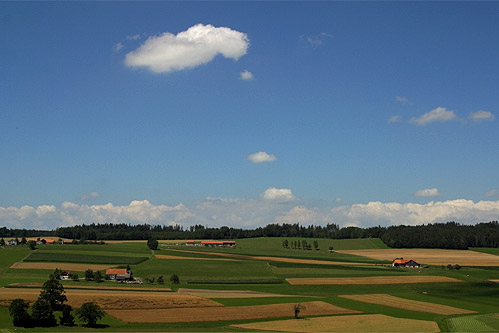 Romont (FR): Aussicht